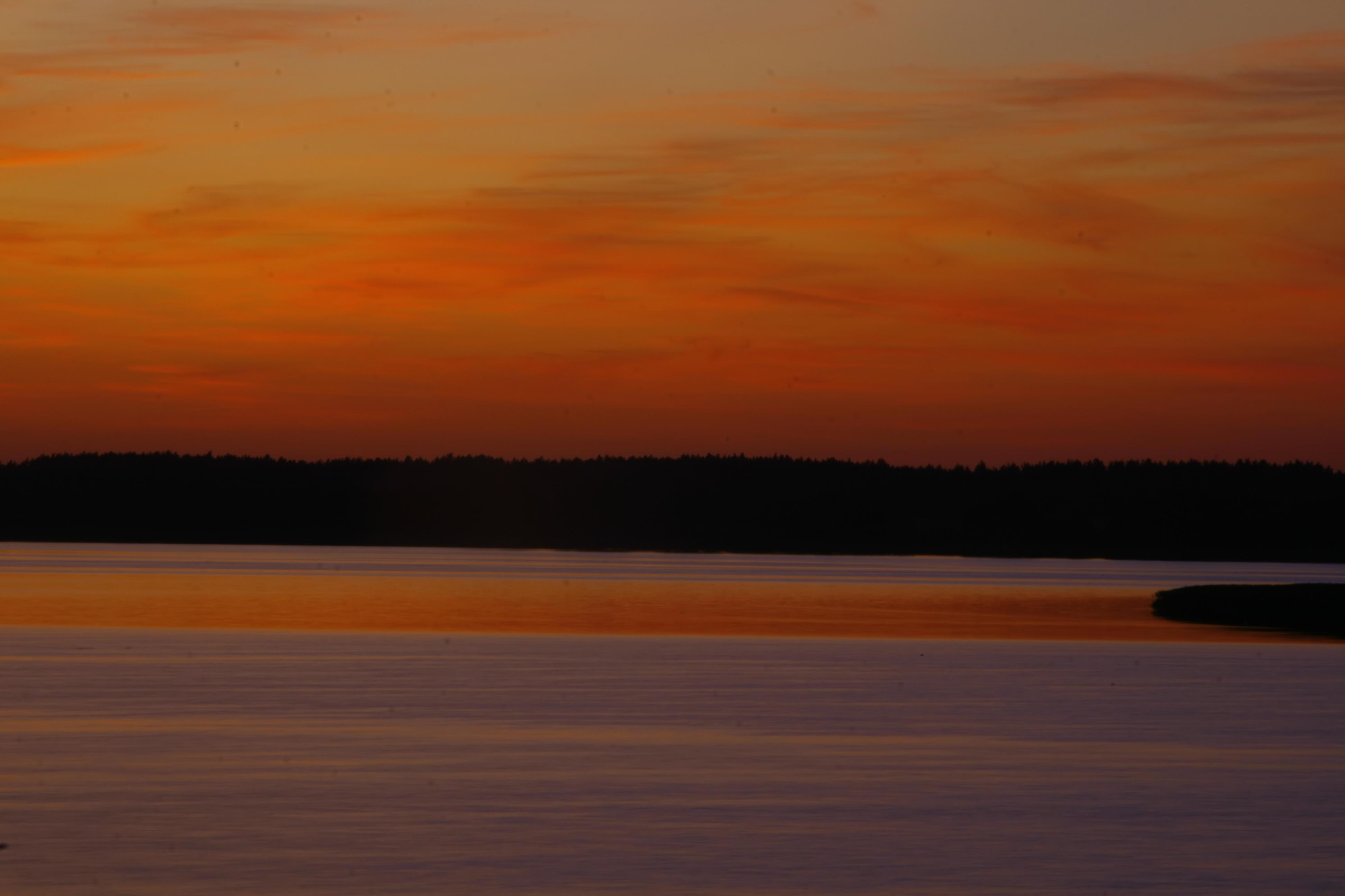 Zachód nad Jeziorem Rajgodzkim